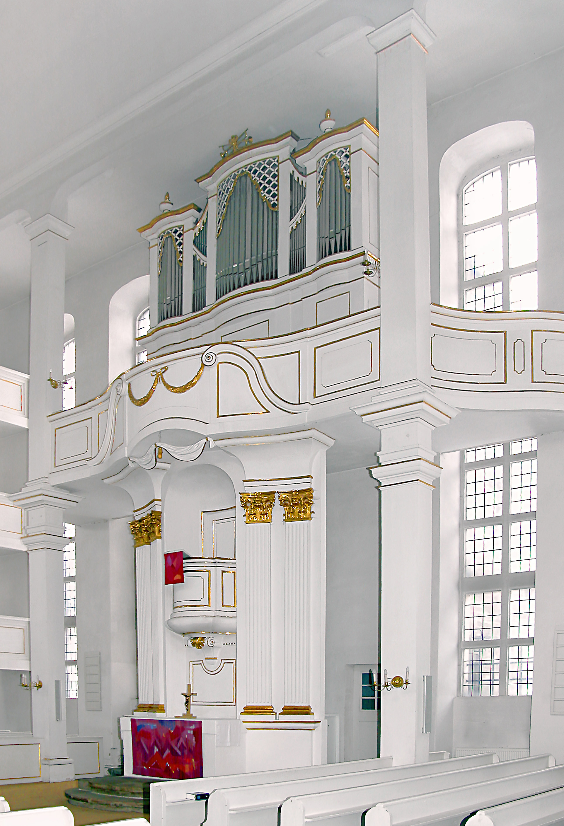 01.04.2001 01847 Lohmen, Dorfstraße (GMP: 50.989566,13.995545): Kirche, Barockbau von 1786-1789 von J. D. Kayser. [DSCN8807.TIF]20060305125DR.JPG(c)Blobelt